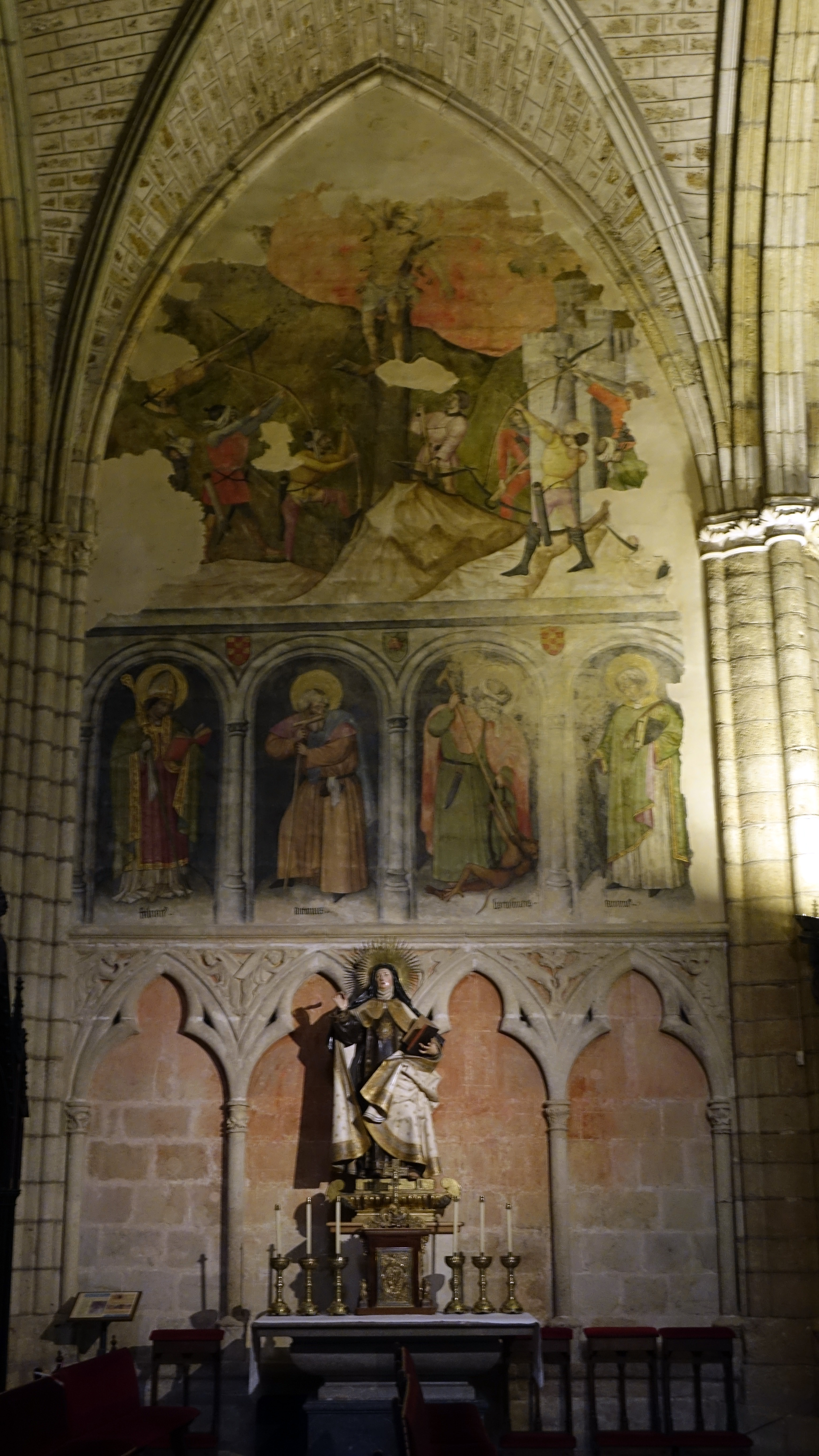 Mural de Nicolás Francés en la capilla de Santa Teresa. Catedral de León.